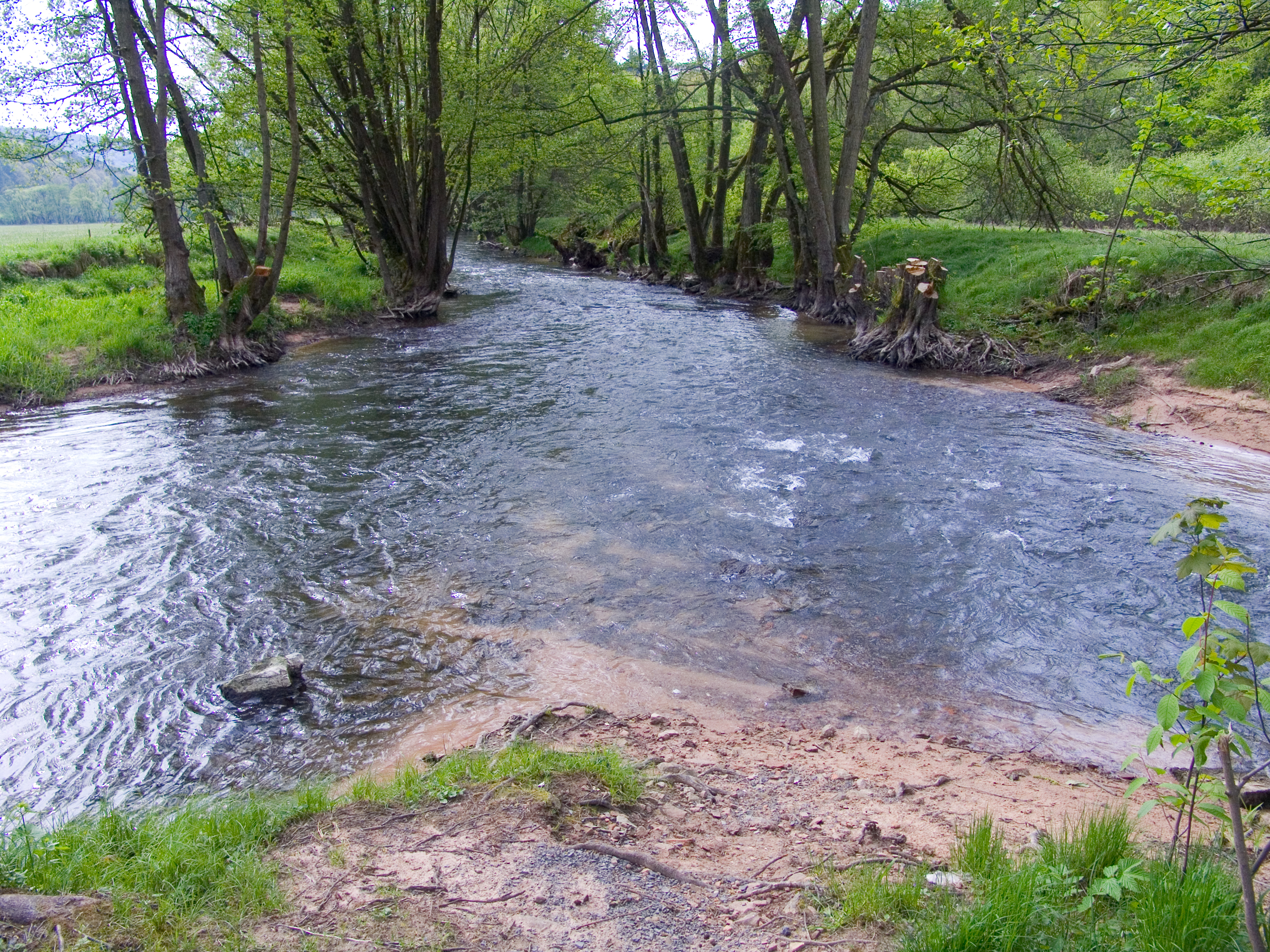 Mündung des Flüsschen Jossa in die Sinn. Jossa, Hessen, Bundesrepublik Deutschland; NSG Sinnwiesen von Altengronau